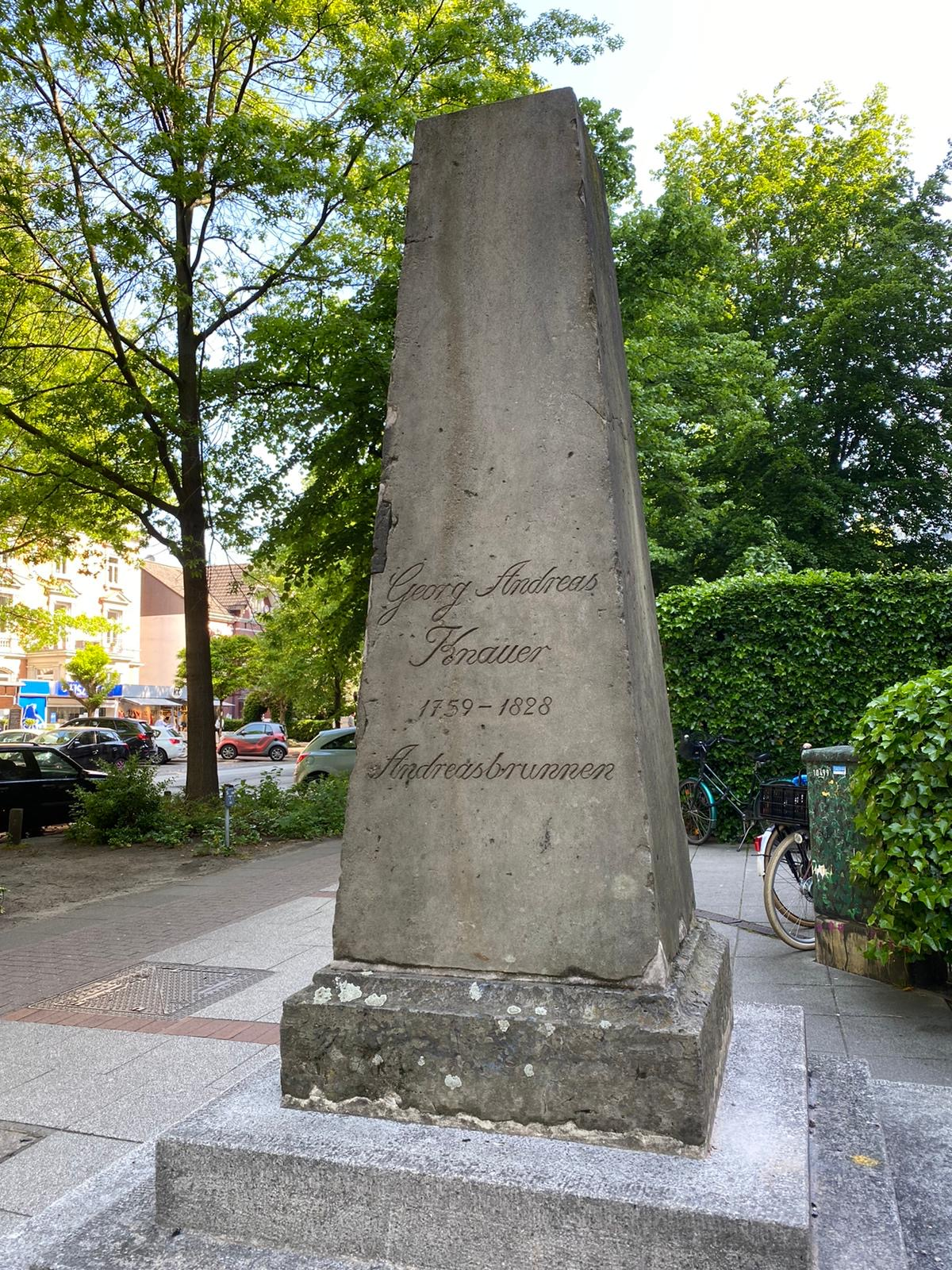 Das Denkmal für Georg Andreas Knauer in Hamburg Eppendorf